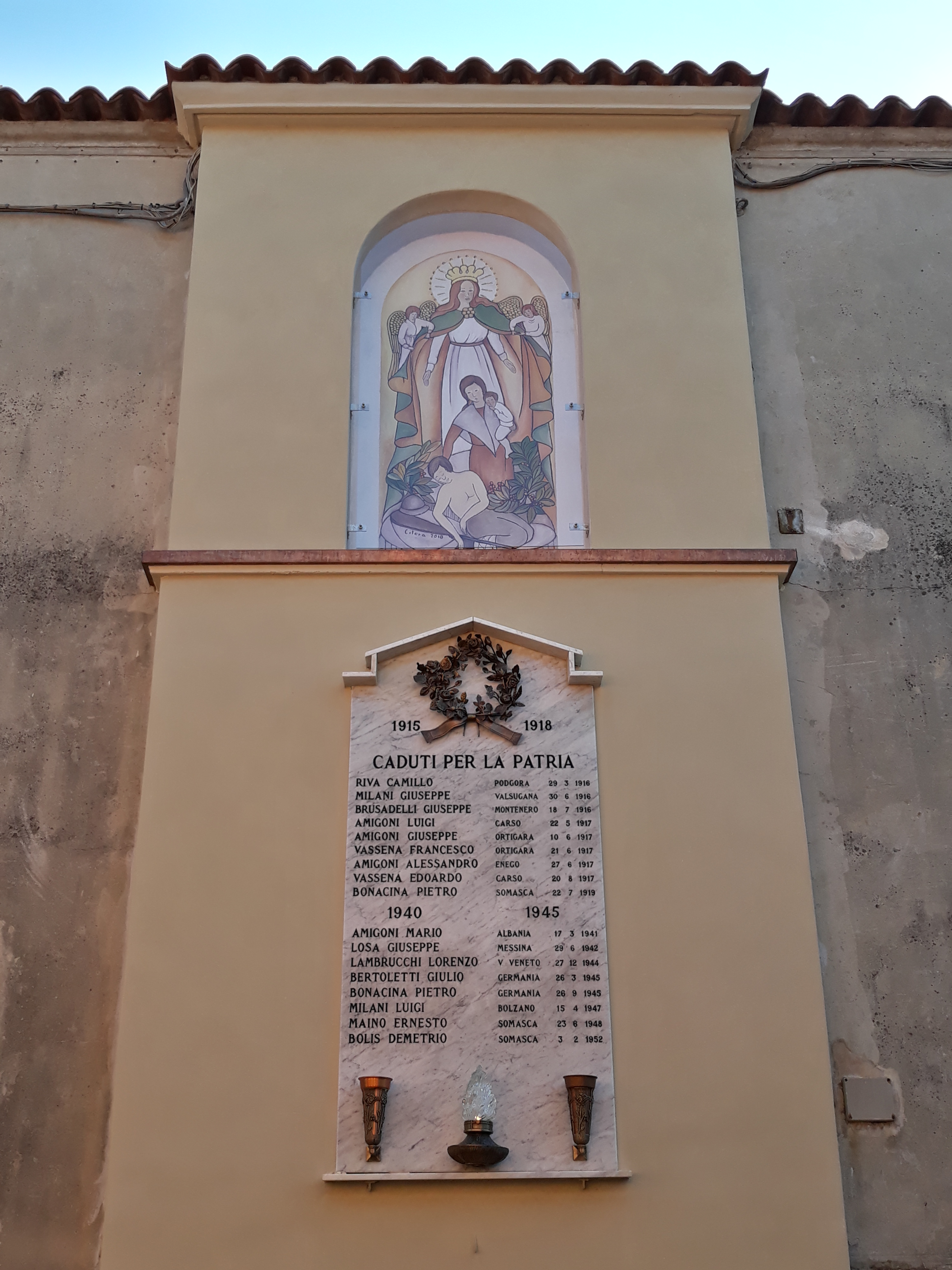 Foto del 2018 raffigurante il monumento appena restaurato